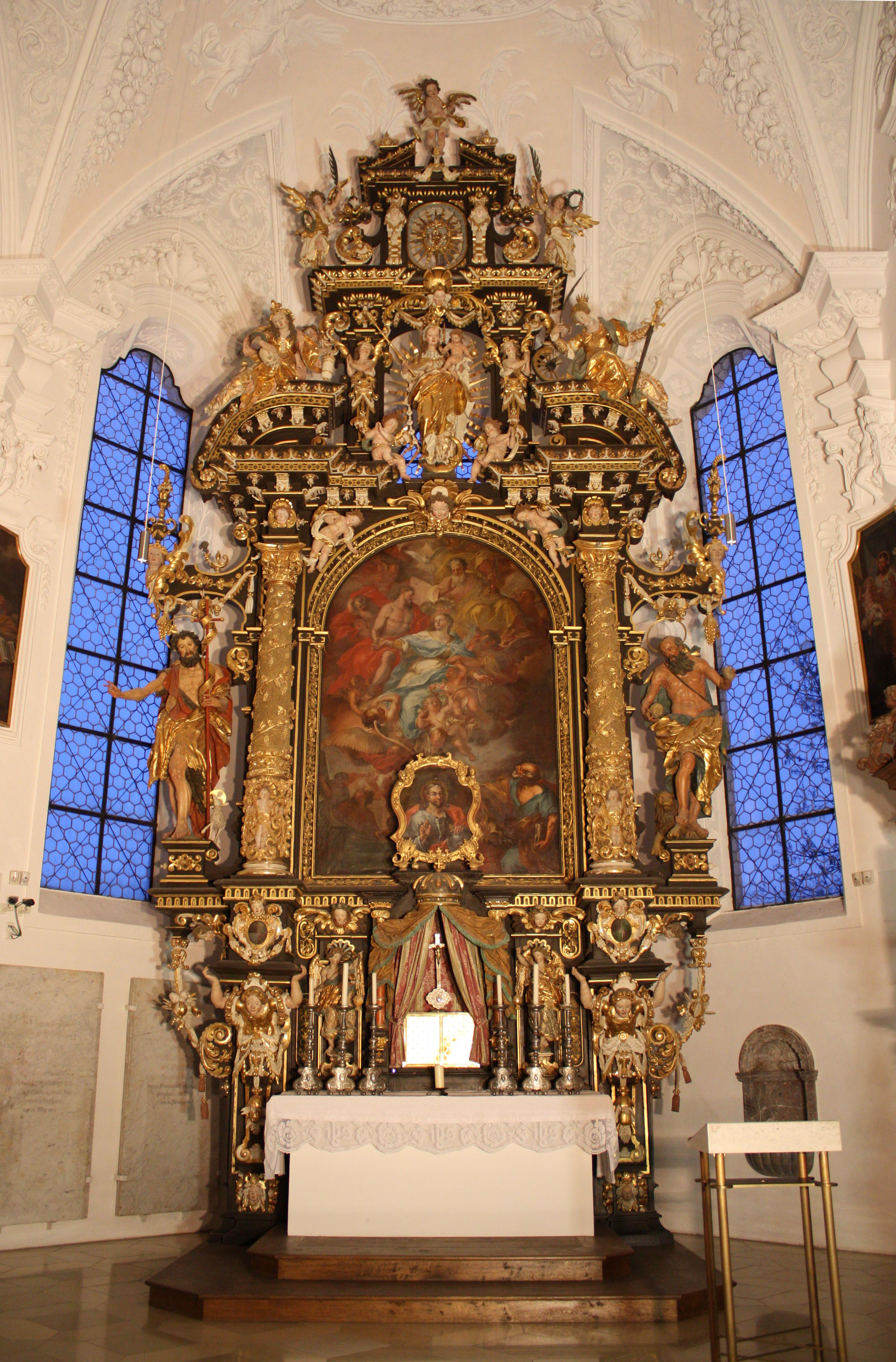 Hochaltar der ehemaligen Klosterkirche der Kartause in Buxheim bei Memmingen - Google Maps - Google Earth